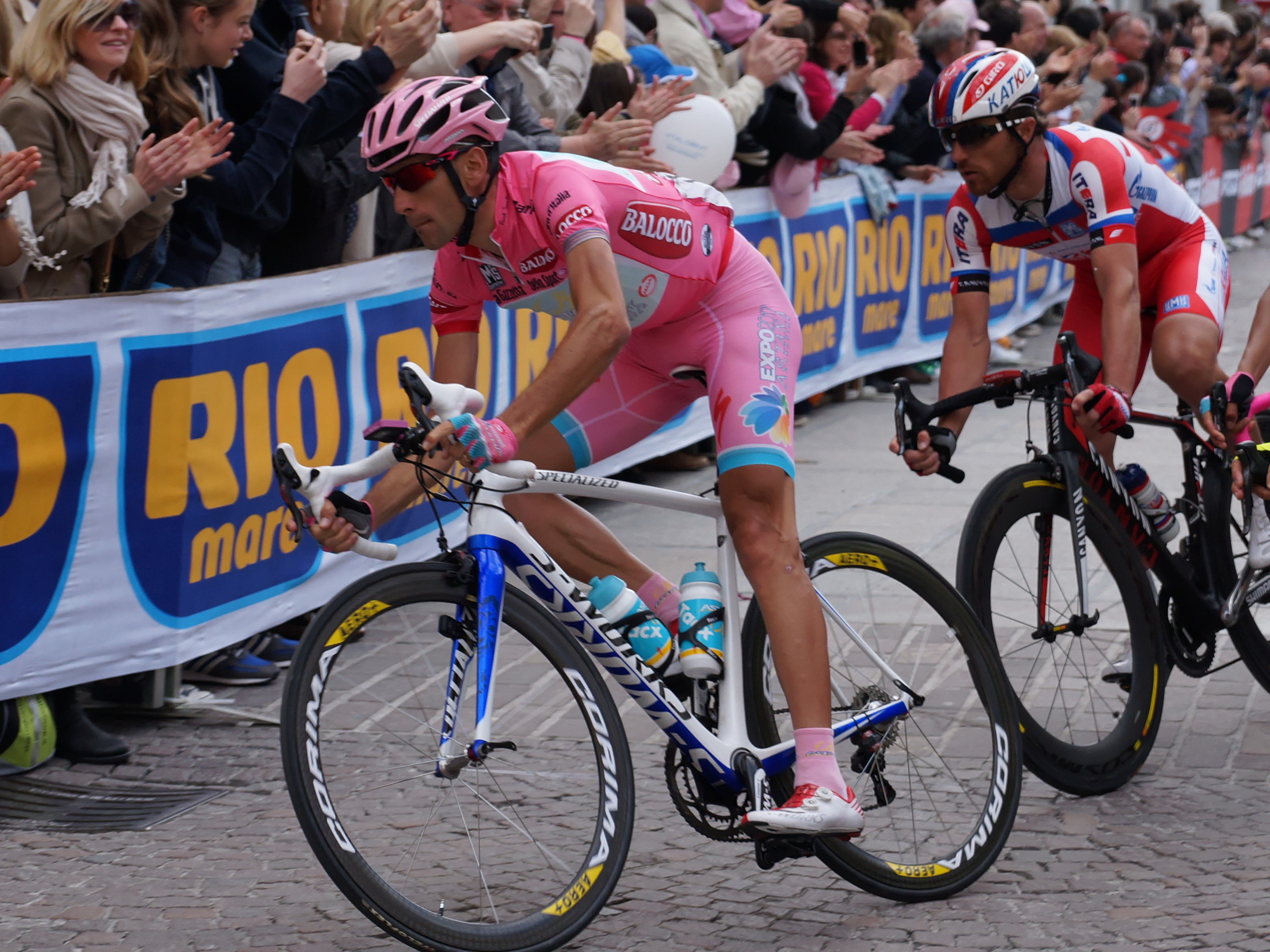 DSC04674_DxO